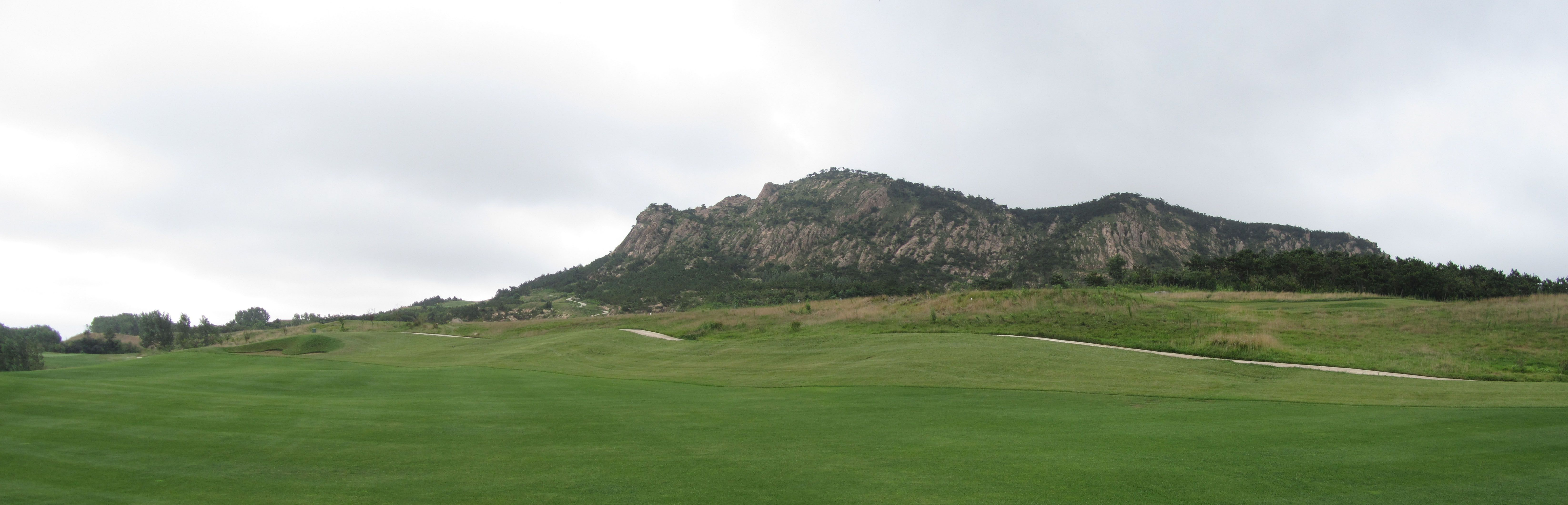 日照市东港区奎山，西侧全景。